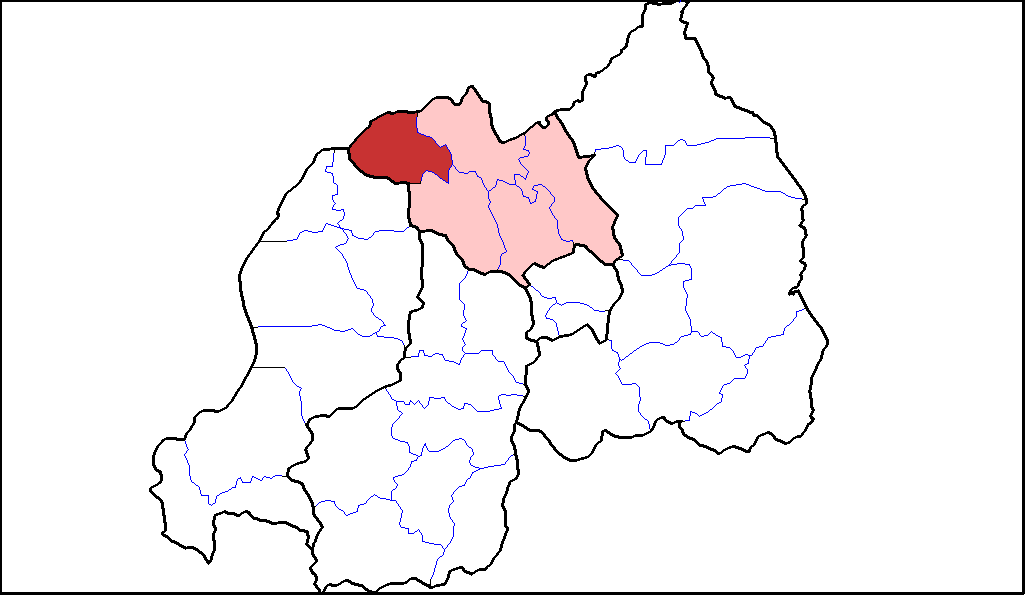 Distretto di Musanze.